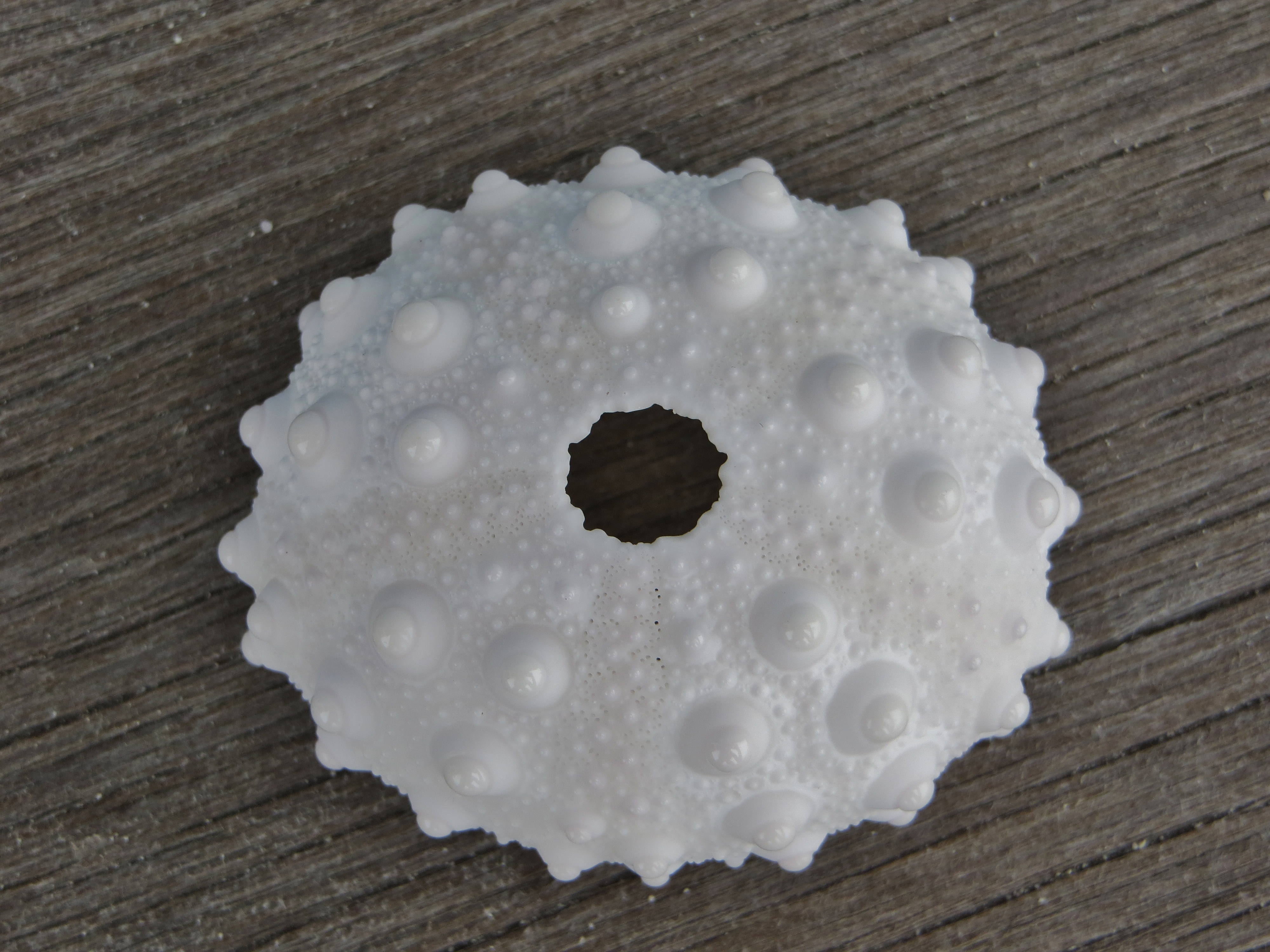 Le test (squelette) en vue aborale (supérieure) d'un oursin-crayon (Heterocentrotus mamillatus), récolté aux Maldives. Le disque apical a disparu.